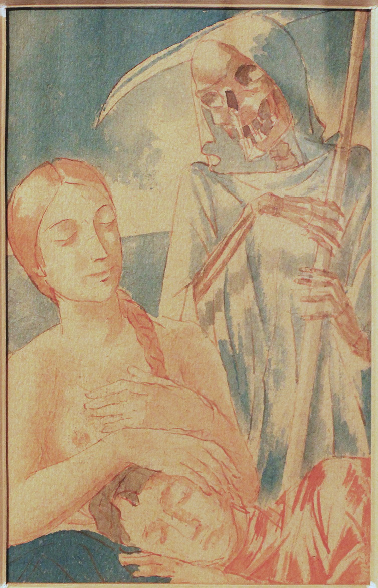 Иллюстрация